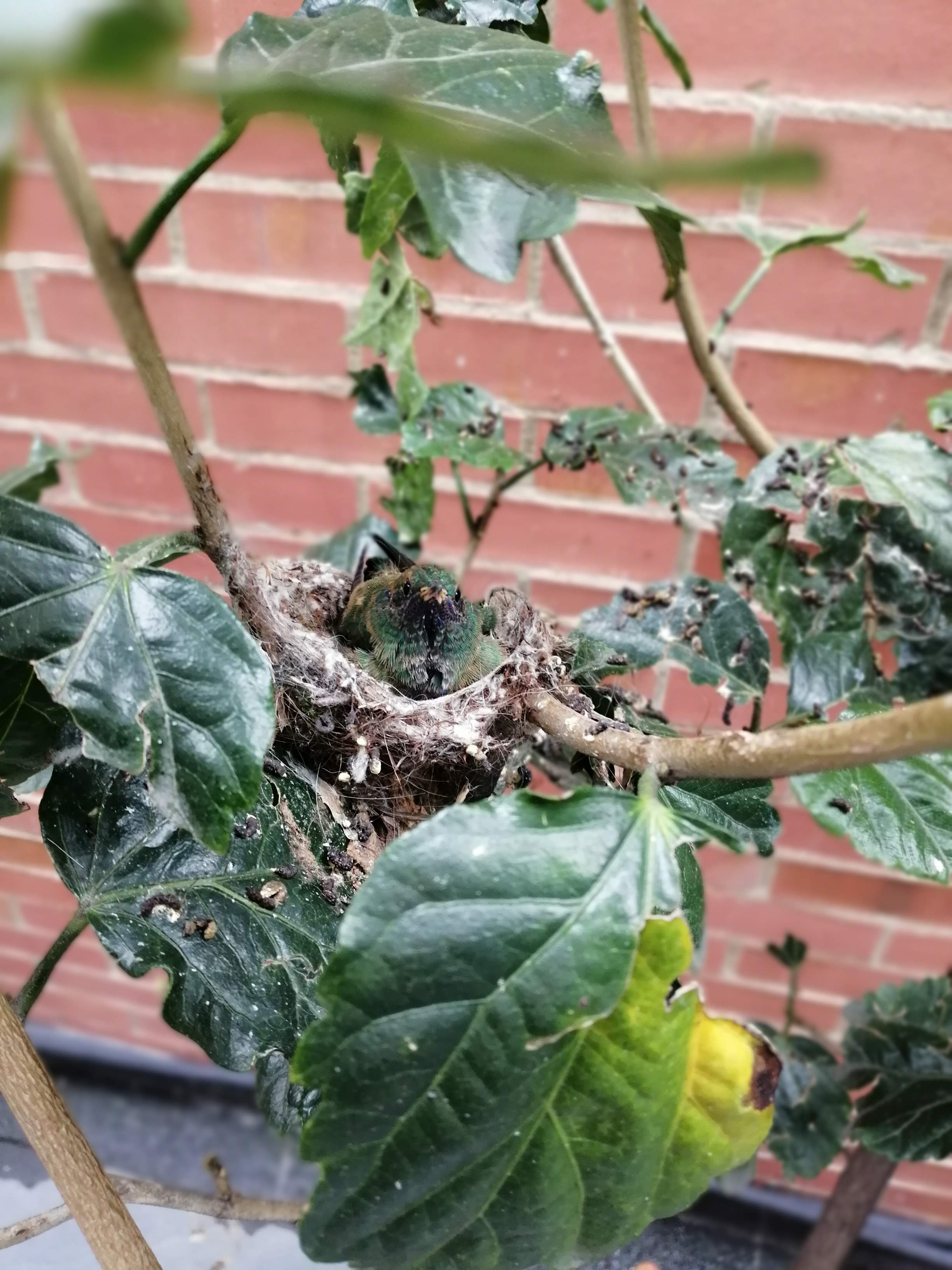 polluelo de colibri bogota colombia